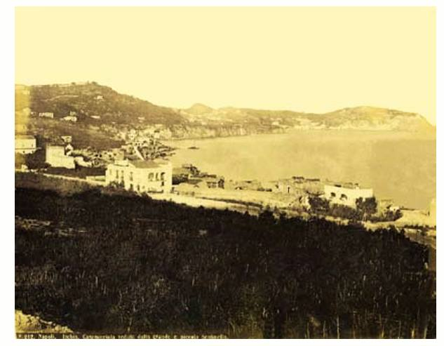 Robert Rive Alternative namesRoberto RiveDescriptionBritish photographerDate of birth/death19th century19th centuryAuthority control : Q2159611 VIAF: 95795676 ULAN: 500018654 , "Napoli (sic!) - Ischia, Casamicciola, veduta dalla grande e piccola Sentinella". Numero di catalogo: 212.